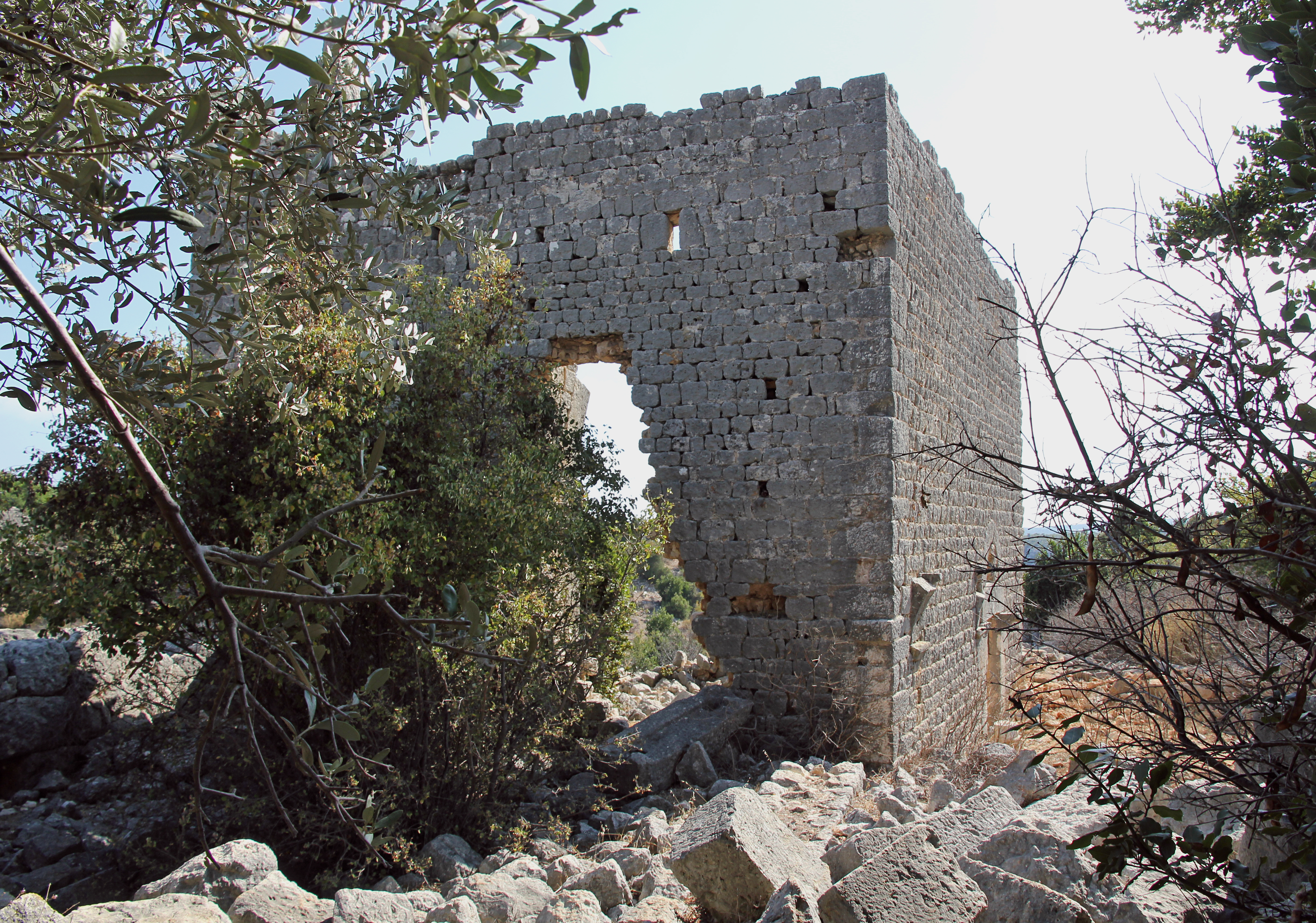 Emirzeli, byzantinische Kleinstadt im Rauhen Kilikien, Südtürkei, herrschaftliches Haus von Nordosten